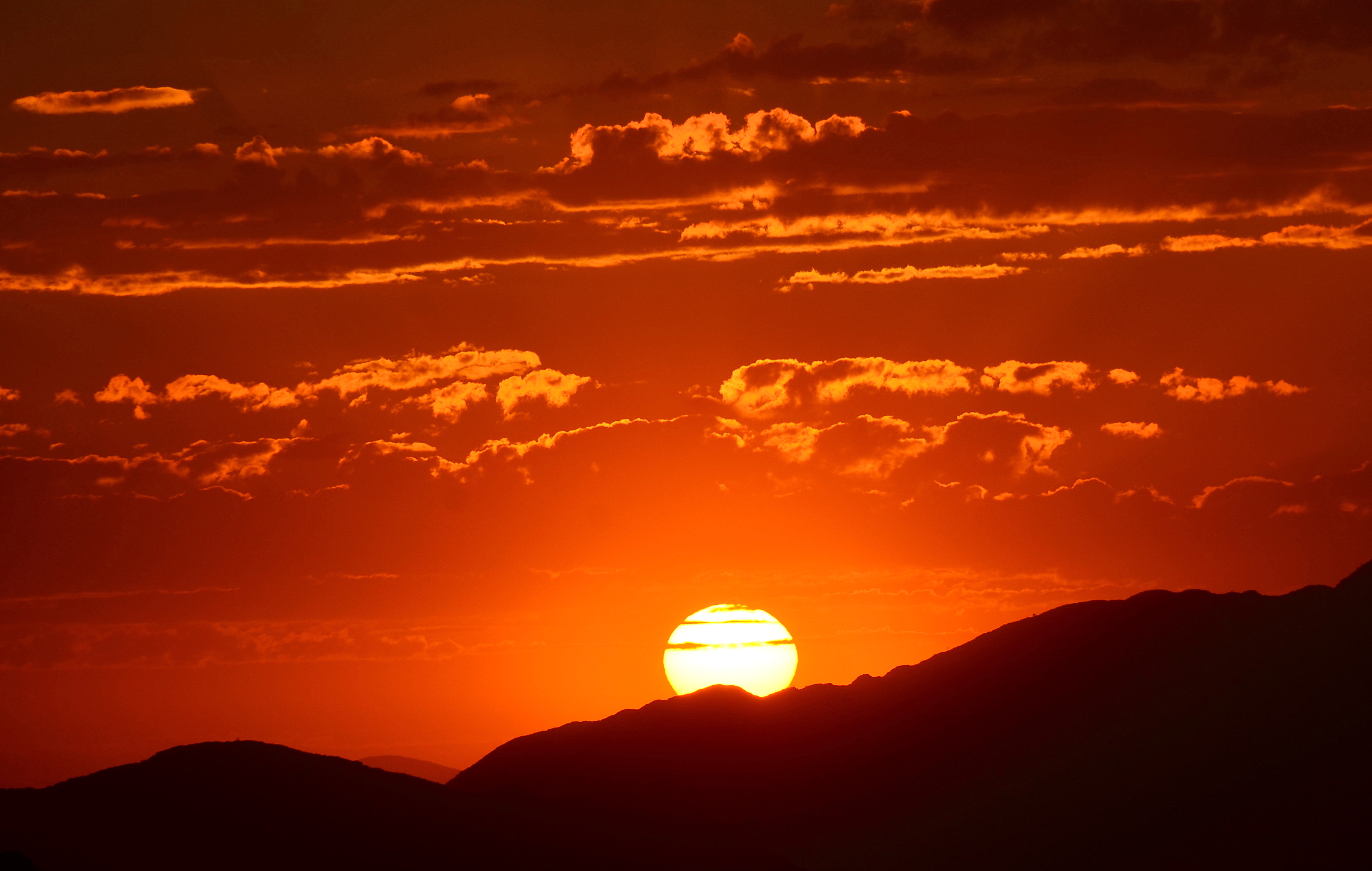 Sonnenuntergang in der Namib (Namibia)